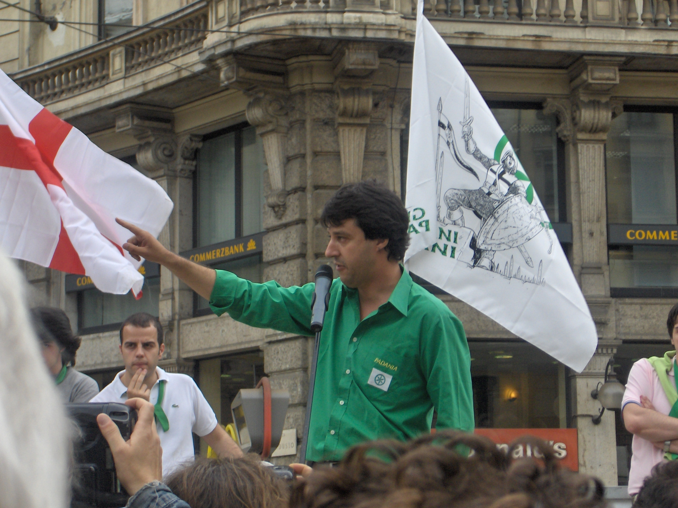 Matteo Salvini parla durante la manifestazione dei Giovani Padani a Milano.